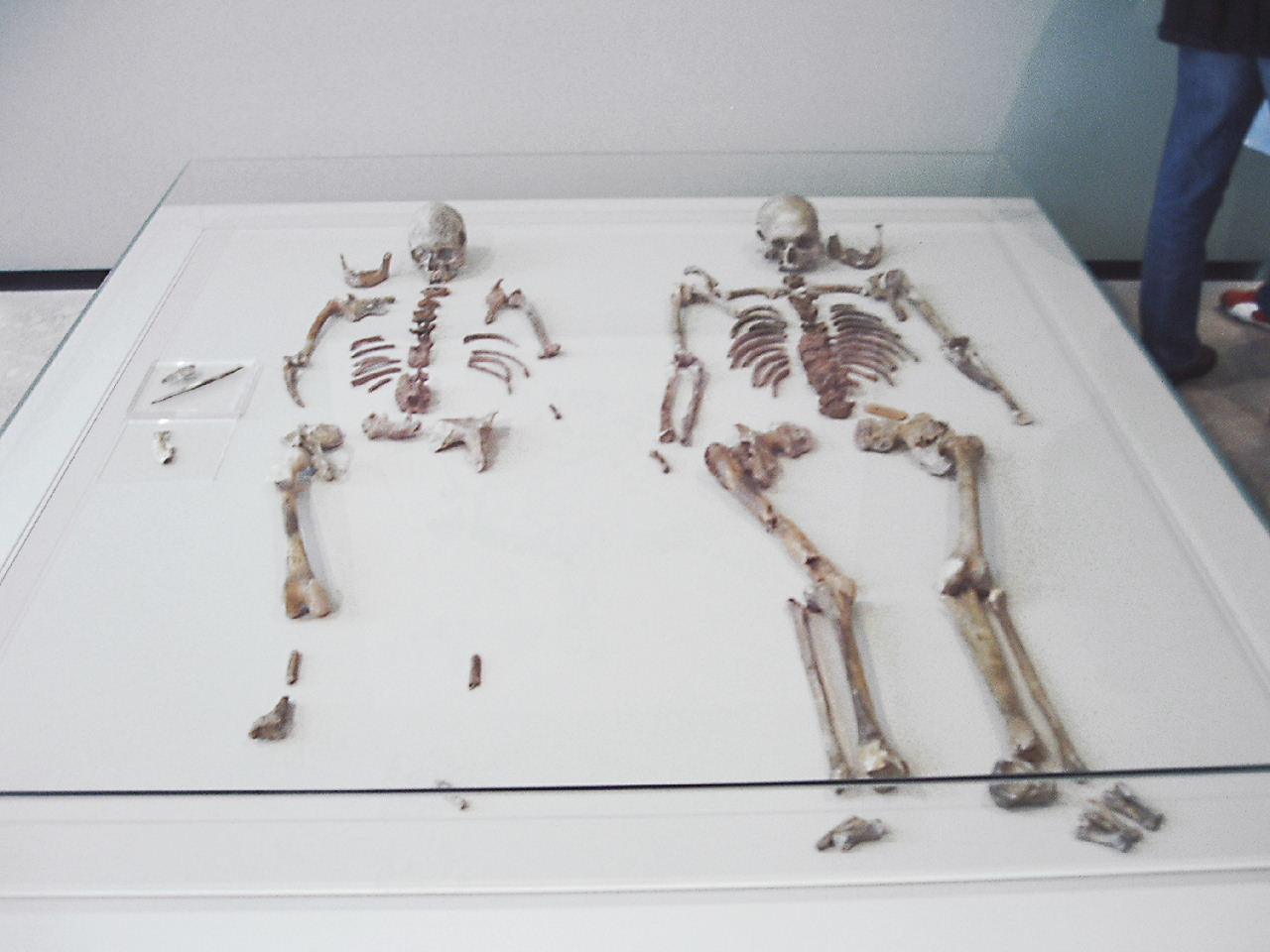 Funde aus dem Doppelgrab von Oberkassel: die beiden Skelette – links die sterblichen Überreste der 20-25-jährigen Frau, rechts des etwa 50 Jahre alten Mannes an der Seite (links) – die beiden Kulturbeigaben, darunter der Teil eines Hundegebisses Standort: Vitrine im Rheinisches Landesmuseum Bonn